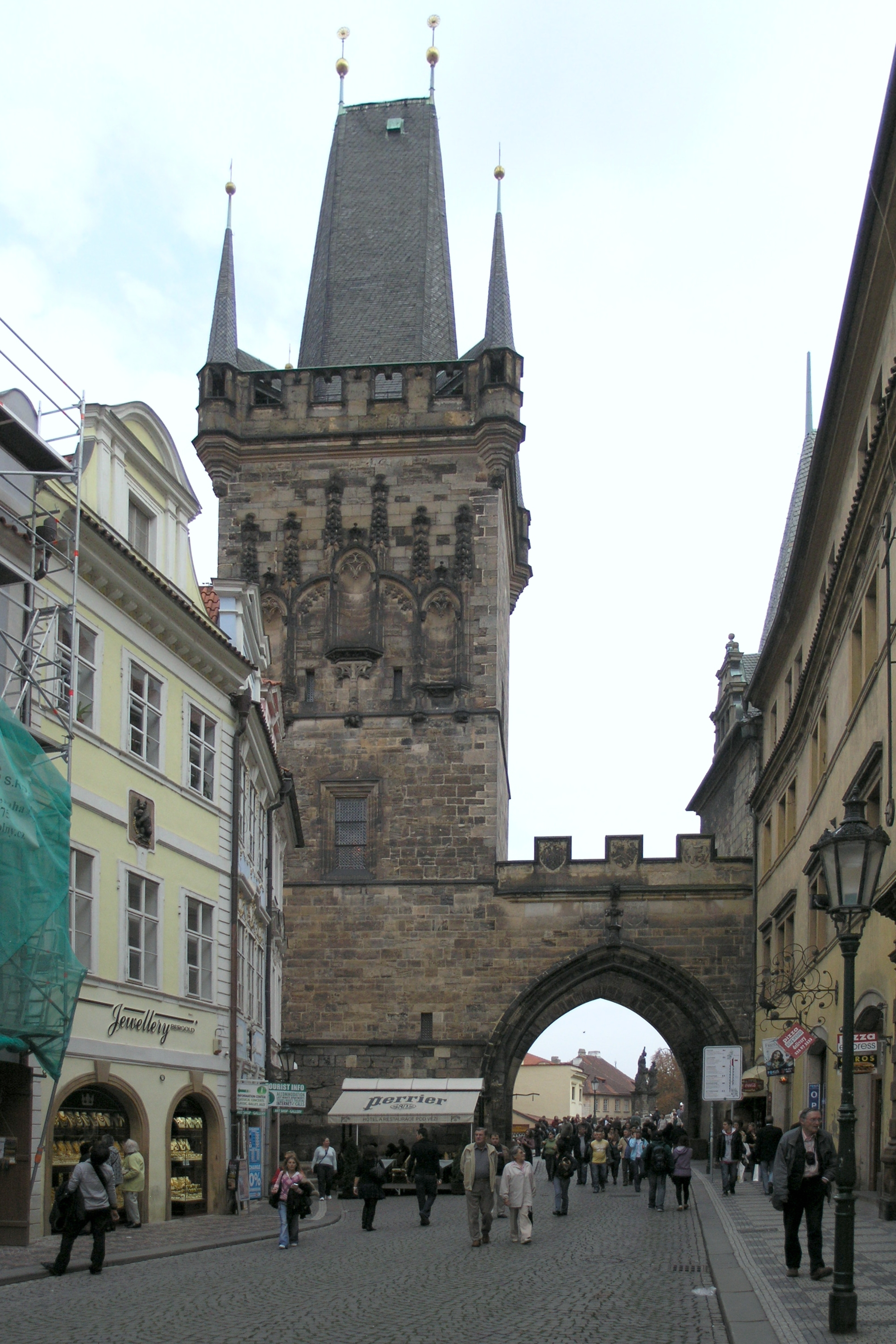 Praha, Malá Strana - Mostecká (pohled ke Karlovu mostu)